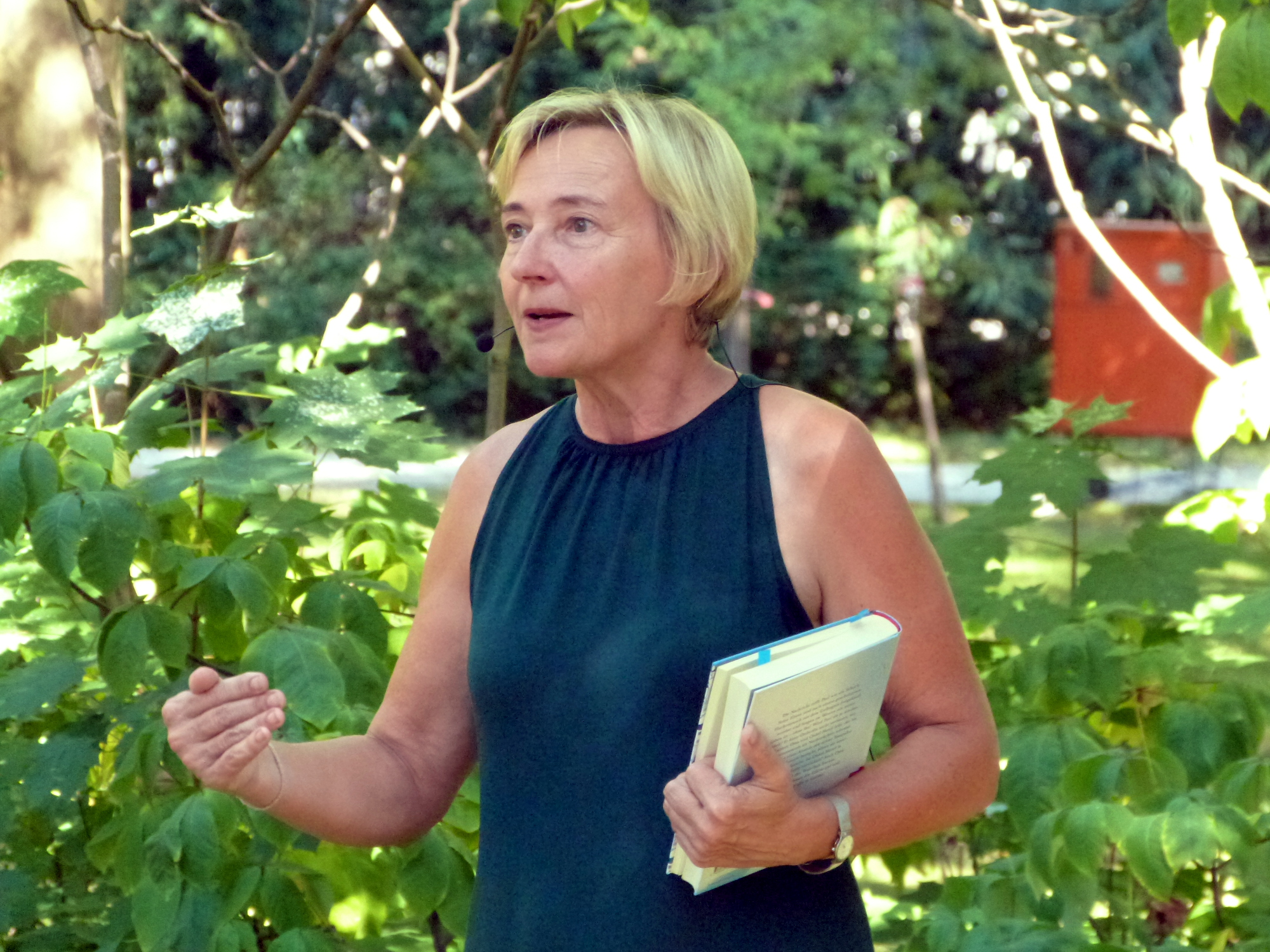 Ute Krause auf dem Erlanger Poetenfest 2016